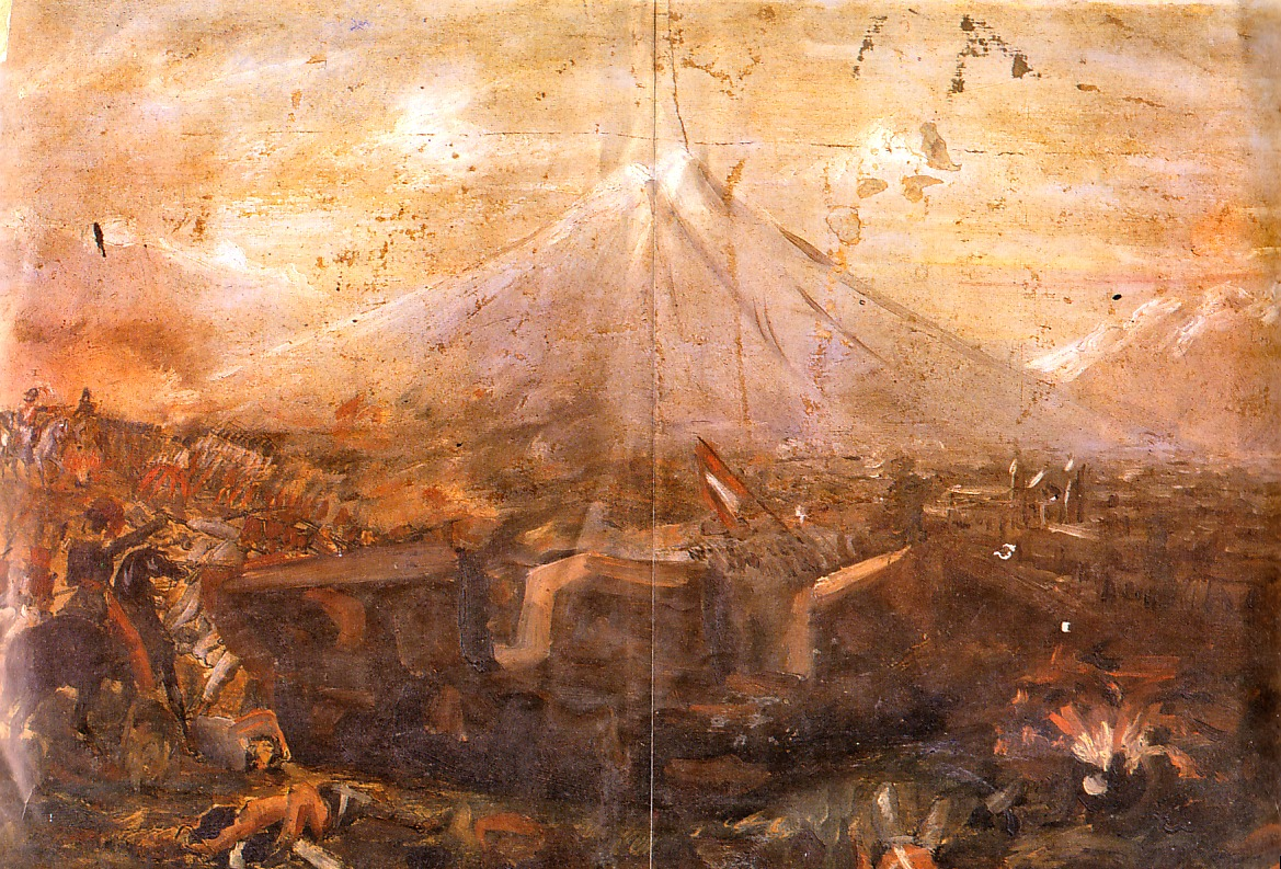 Estampa que representa el sitio de Arequipa, Perú, en 1867. A la izquierda se ve al presidente Mariano Ignacio Prado dirigiendo las operaciones; al fondo la ciudad coronada por el volcán Misti.